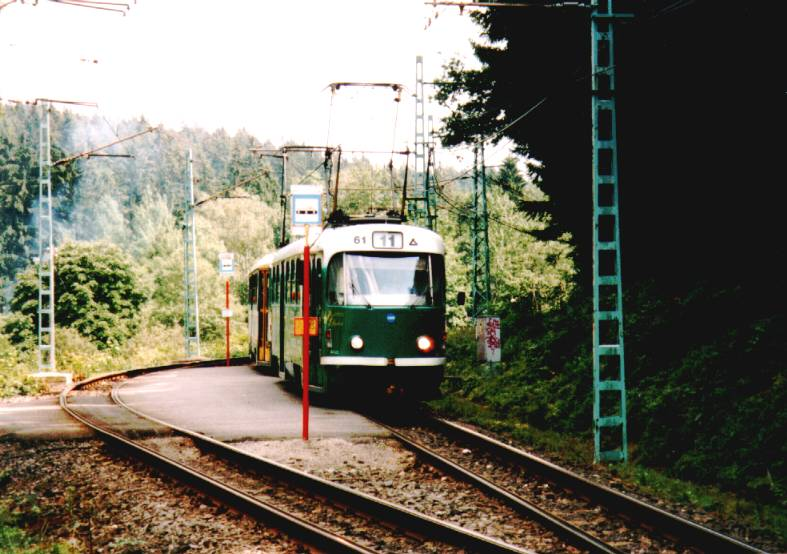 Tramvaje na dráze Liberec - Jablonec